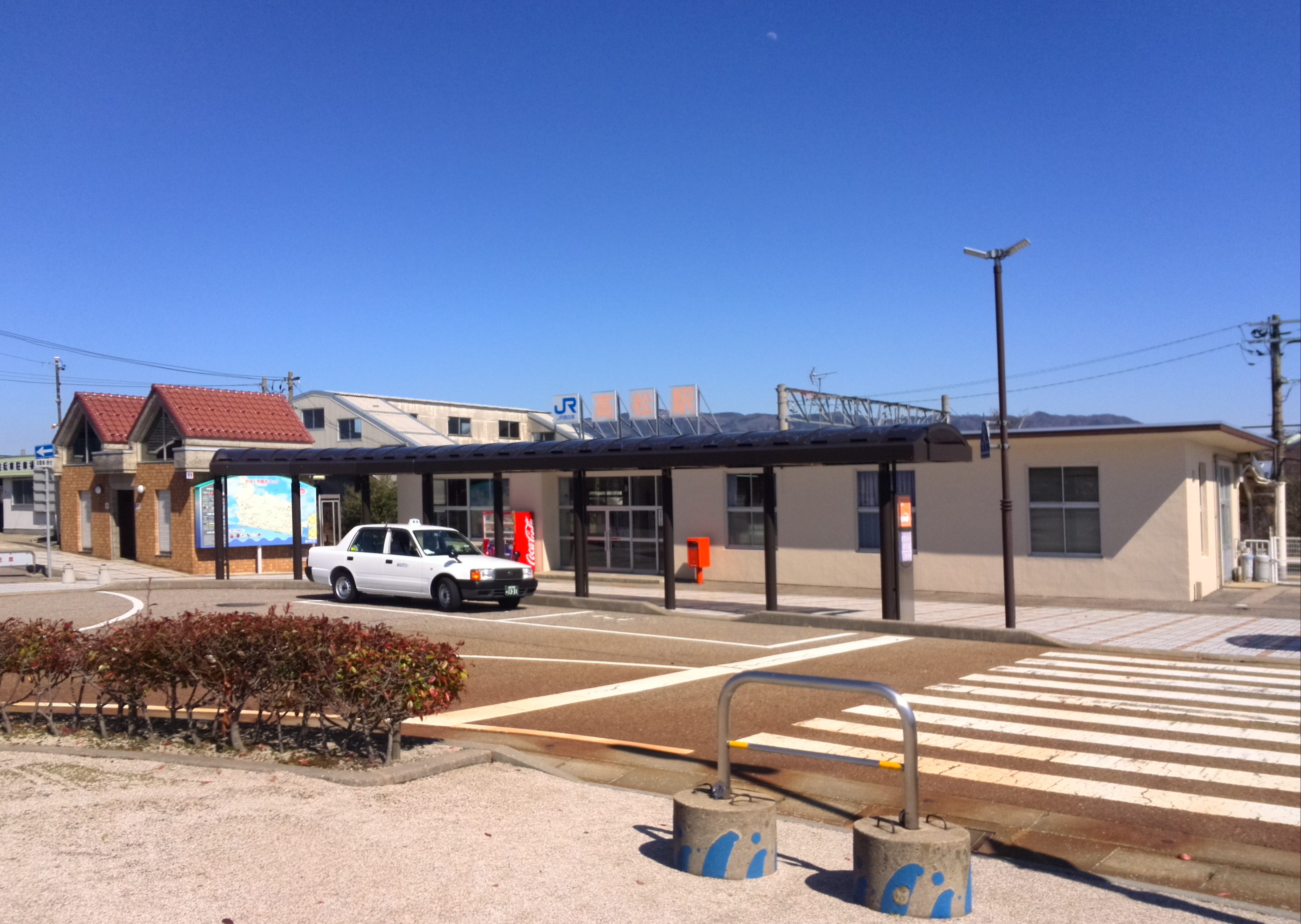 七尾線高松駅舎